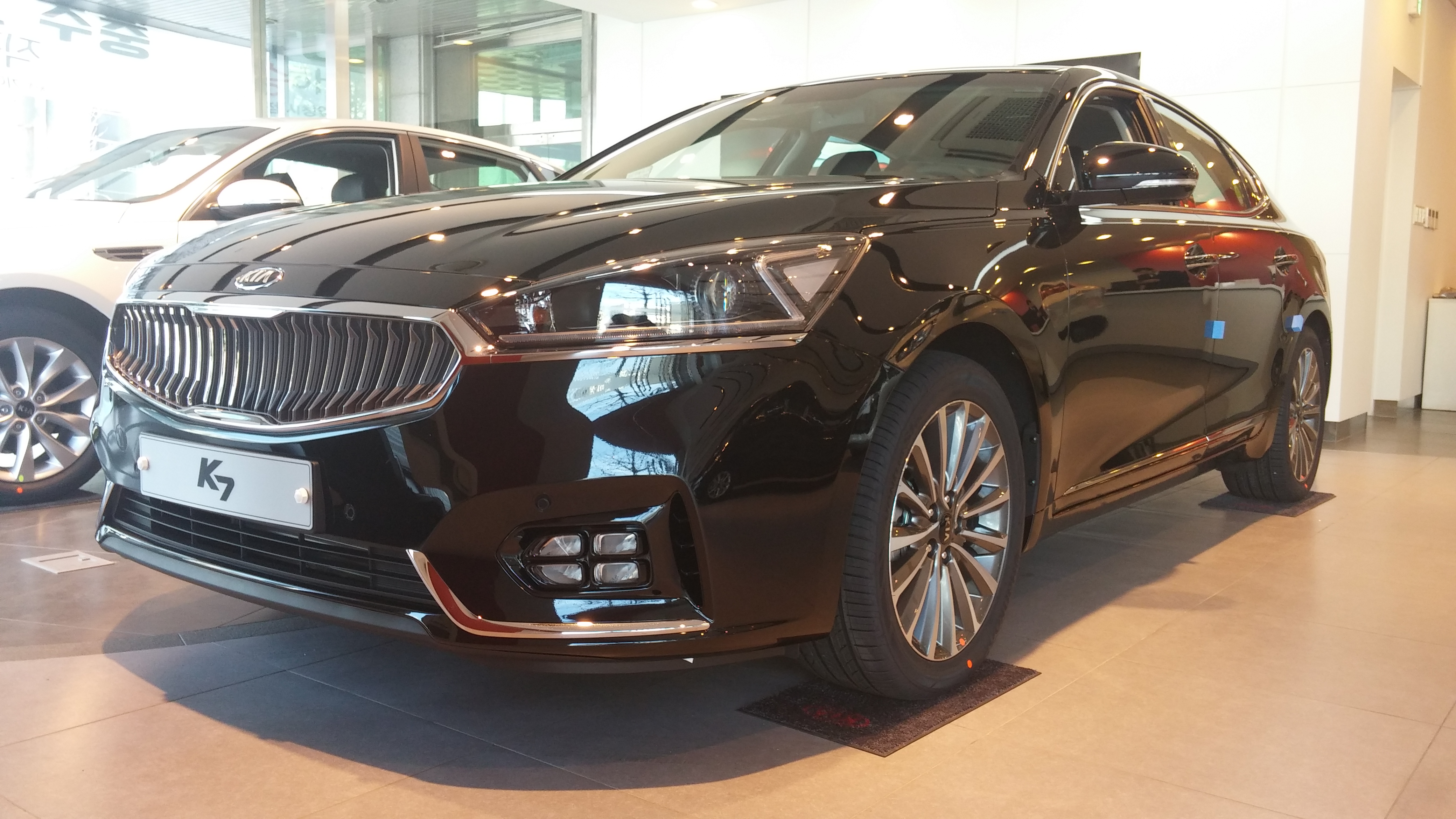 기아 올 뉴 K7 정측면